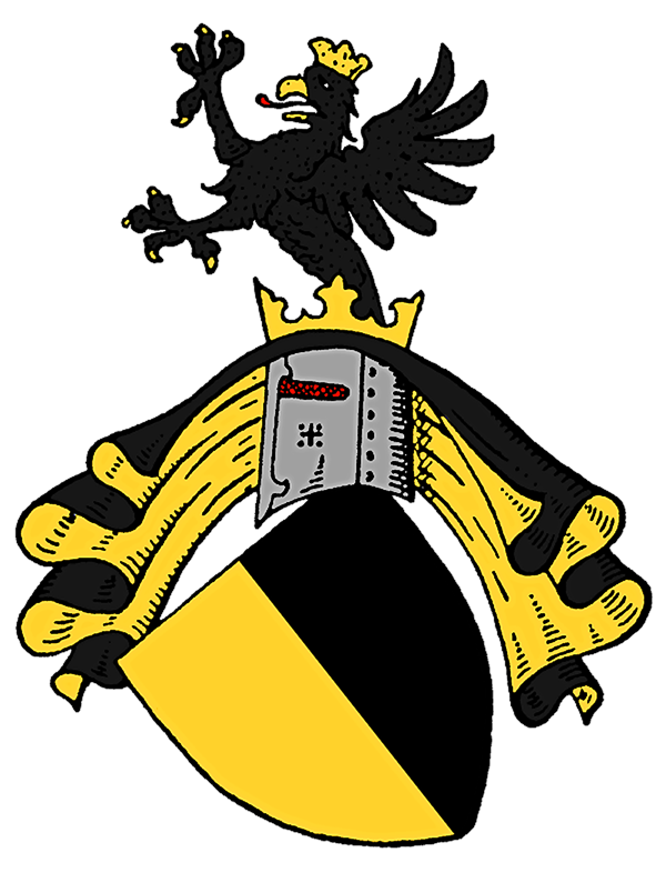 Stammwappen derer von Buchwitz